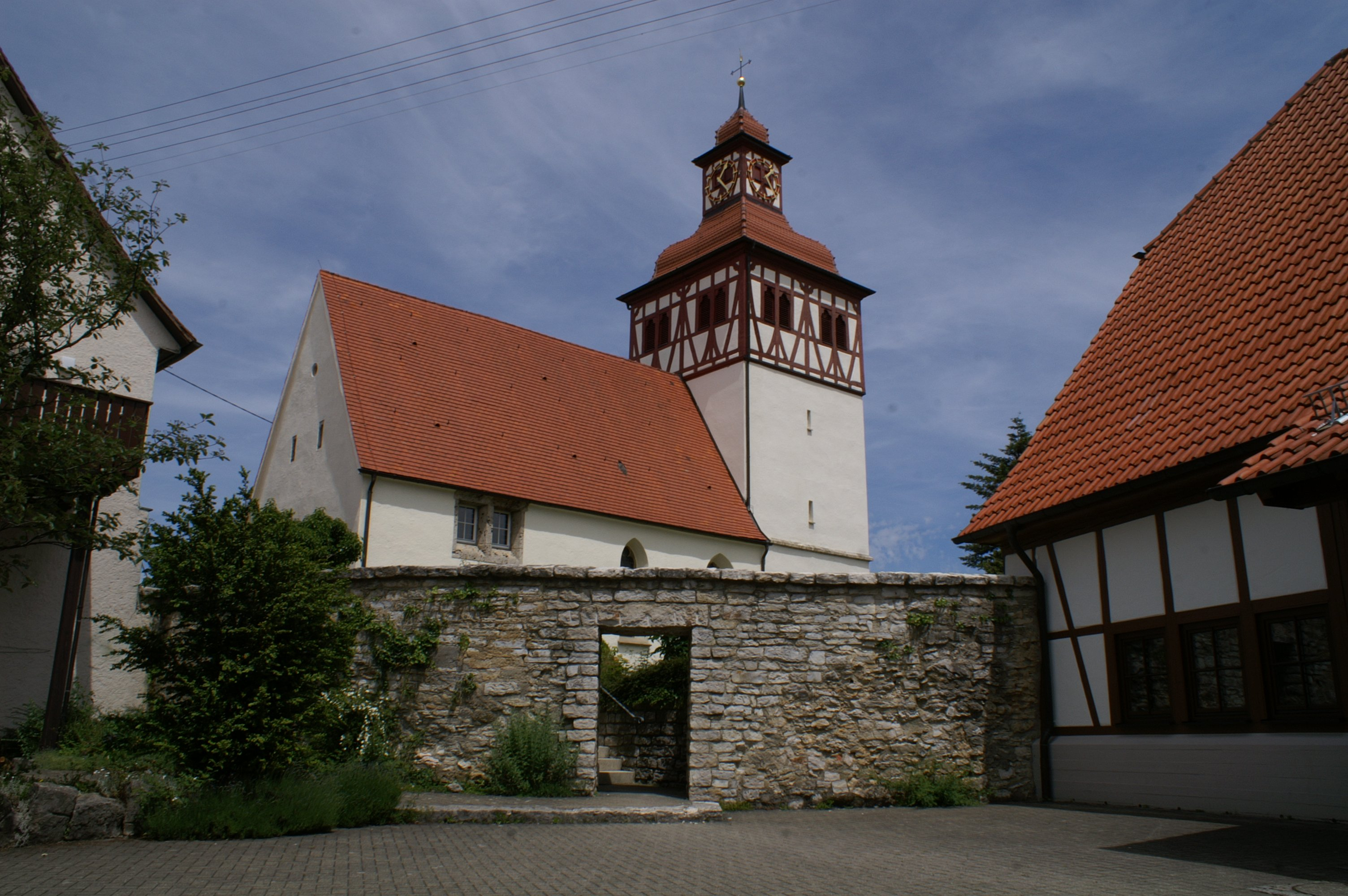 Die Peter- und Paul-Kirche in Grabenstetten wurde zum ersten Mal 1275 urkundlich erwähnt